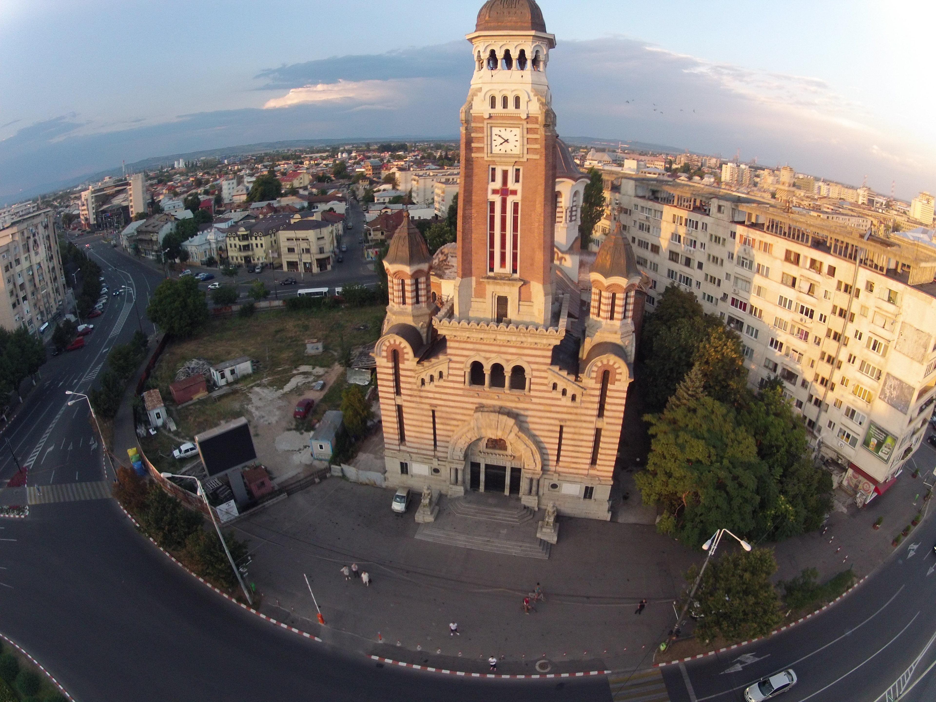 Fotografie din aer a catedralei din Ploiesti.